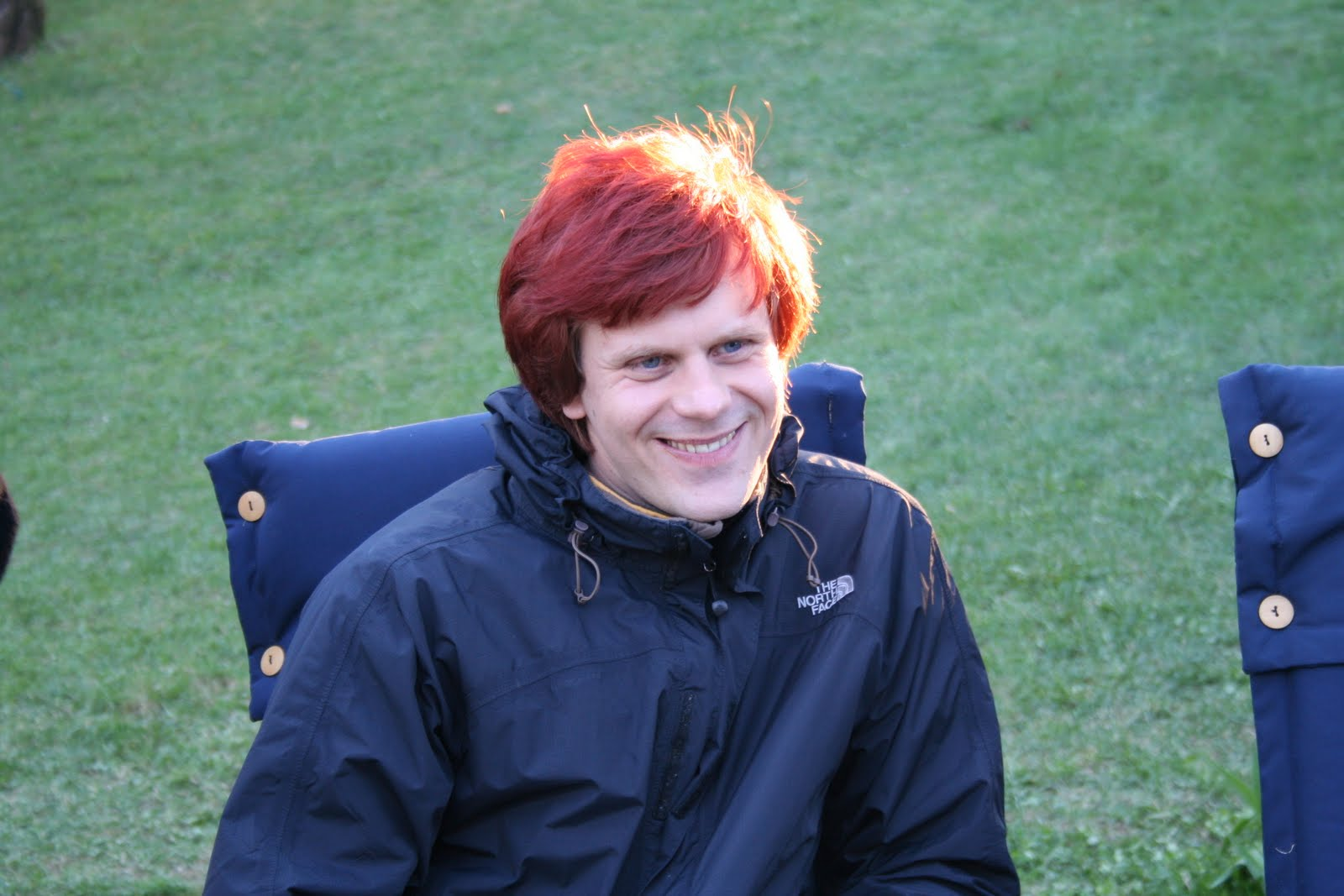 Karol Kuntsel lastesaate "Saame kokku Tomi juures" viimase osa võttepäeval.